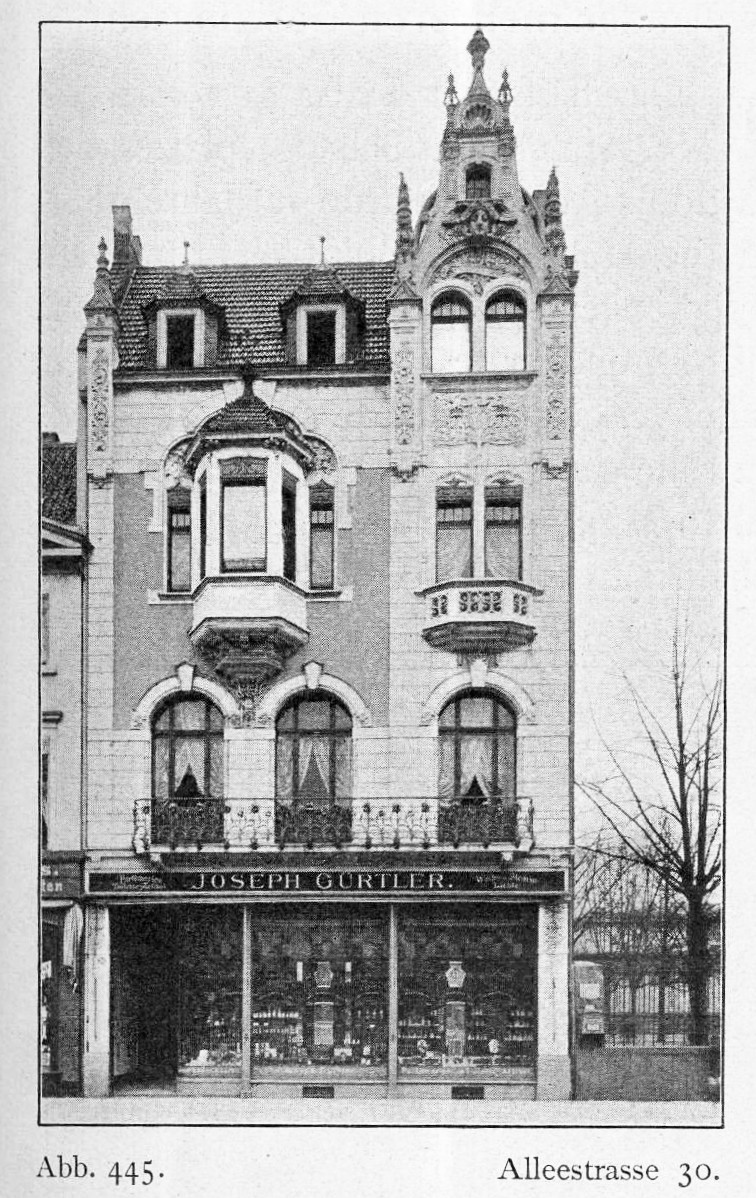 Gürtler’sches Geschäftshaus an der Alleestraße 30 (heute: Heinrich-Heine-Allee) in Düsseldorf, erbaut von 1897 bis 1898, Architekt Gottfried Wehling, Bauherr Joseph Gürtler